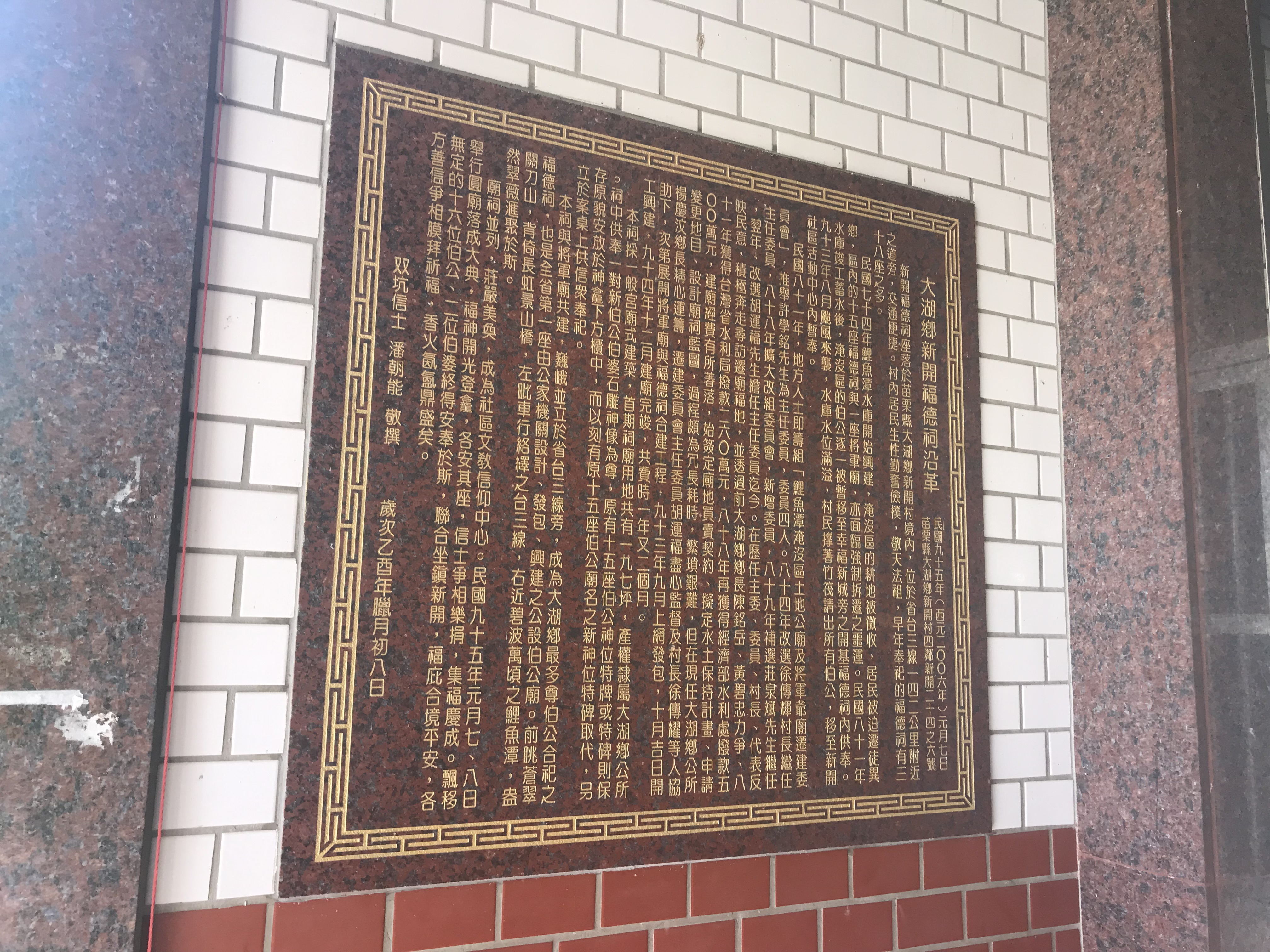 新開福德祠沿革